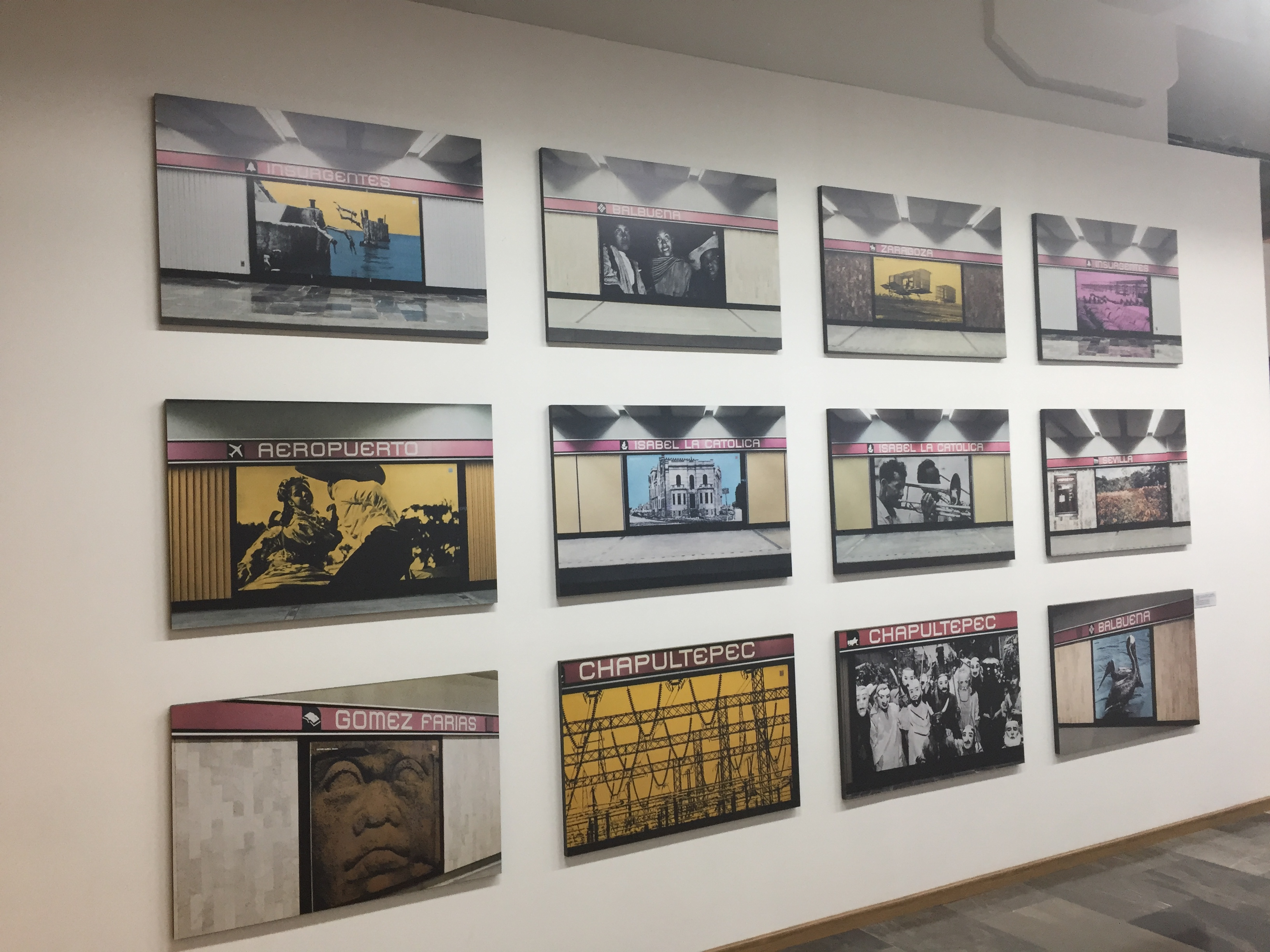 Detalle de la exposición "Imagen México" en el Museo del Metro